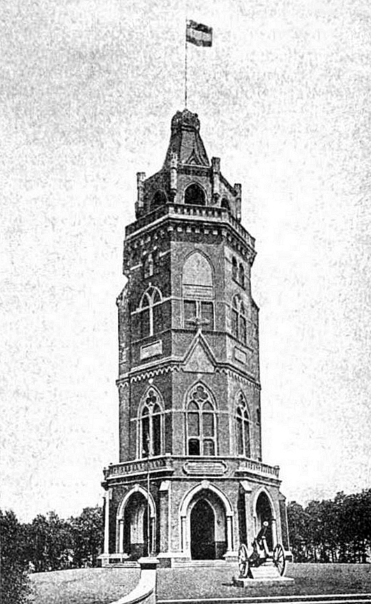 Ehem. Kaiser-Wilhelm-Turm in Essen-Stoppneberg